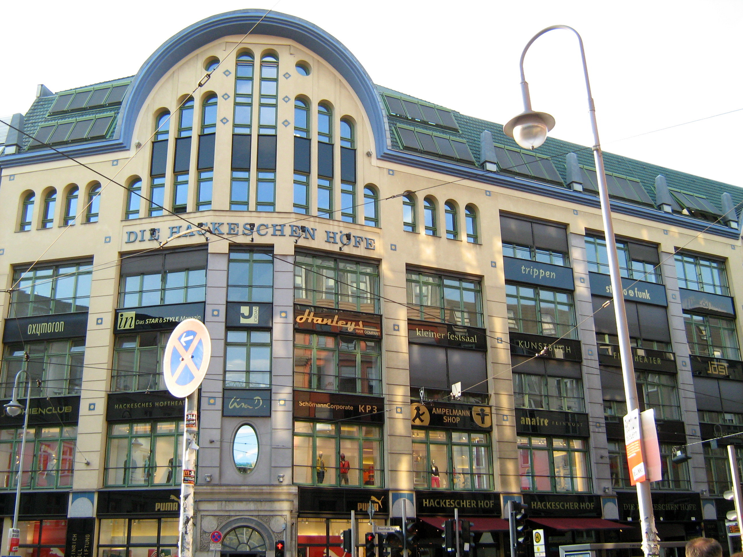 Hackesche Höfe in Berlin 2009